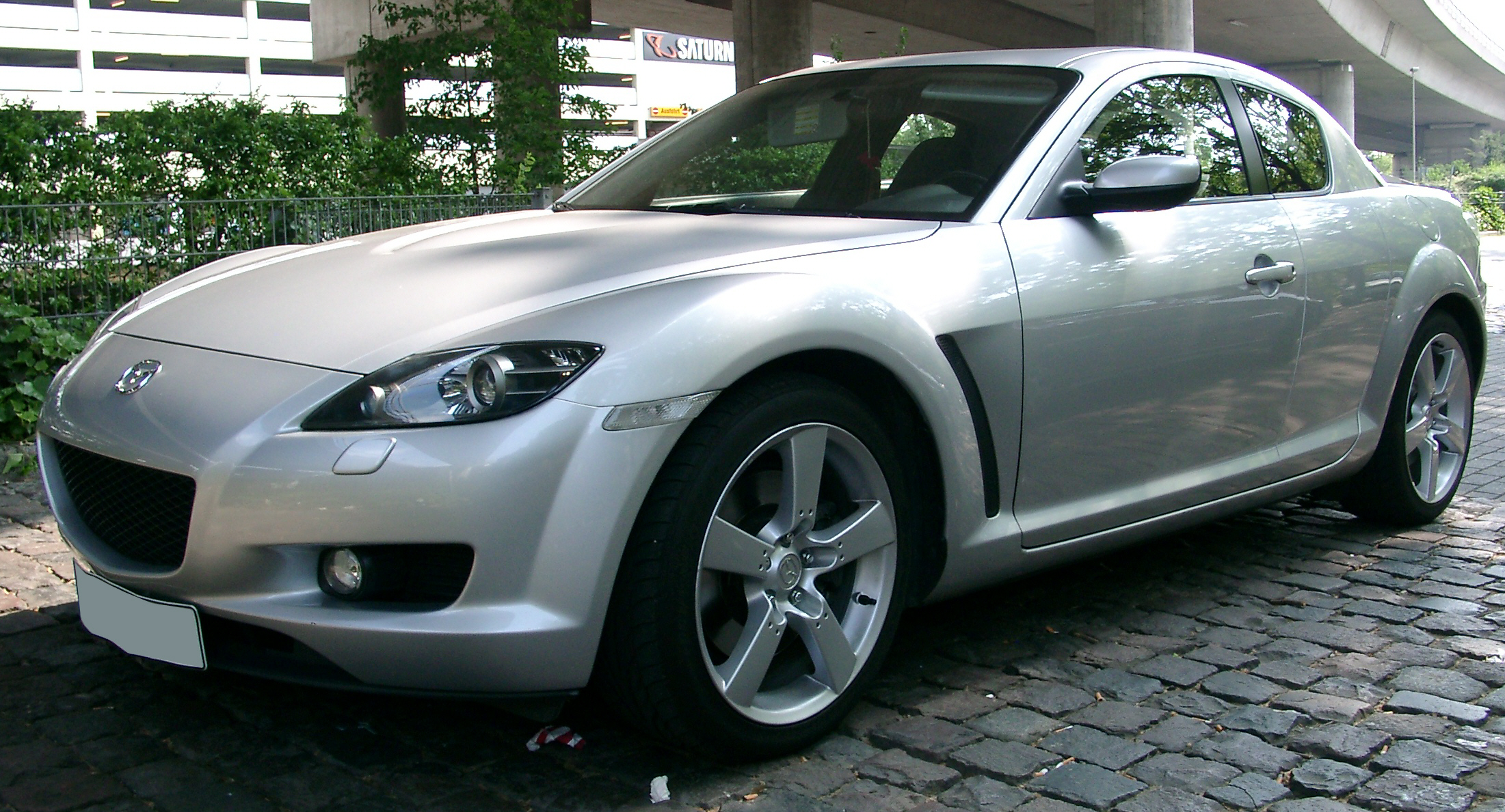 Mazda RX8